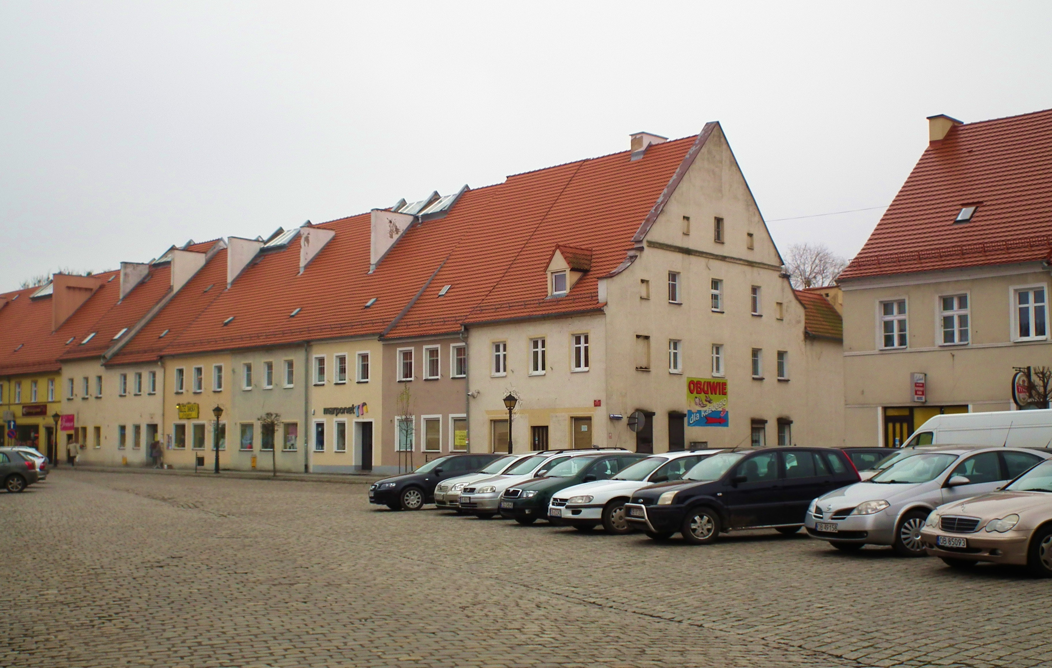 Rynek w Lewinie Brzeskim.